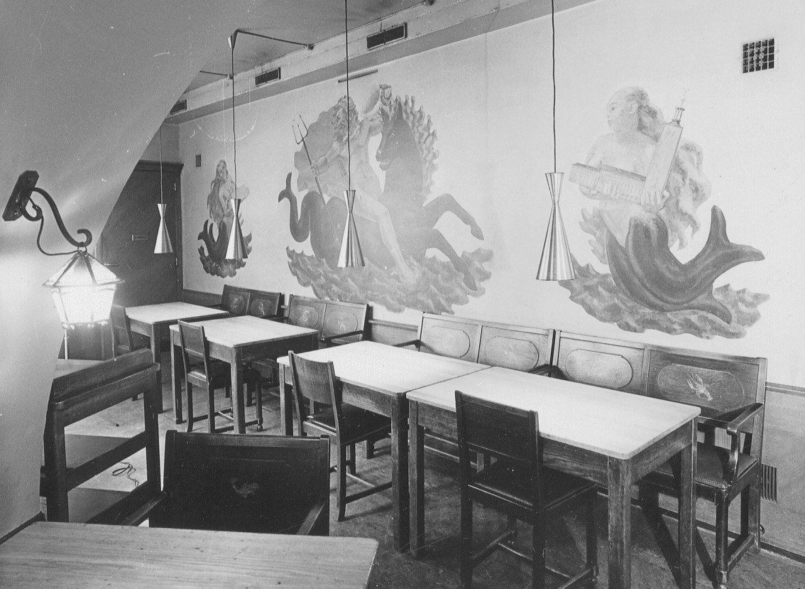 Restaurang Sturehofs interiör, väggmålning av Kurt Jungstedt